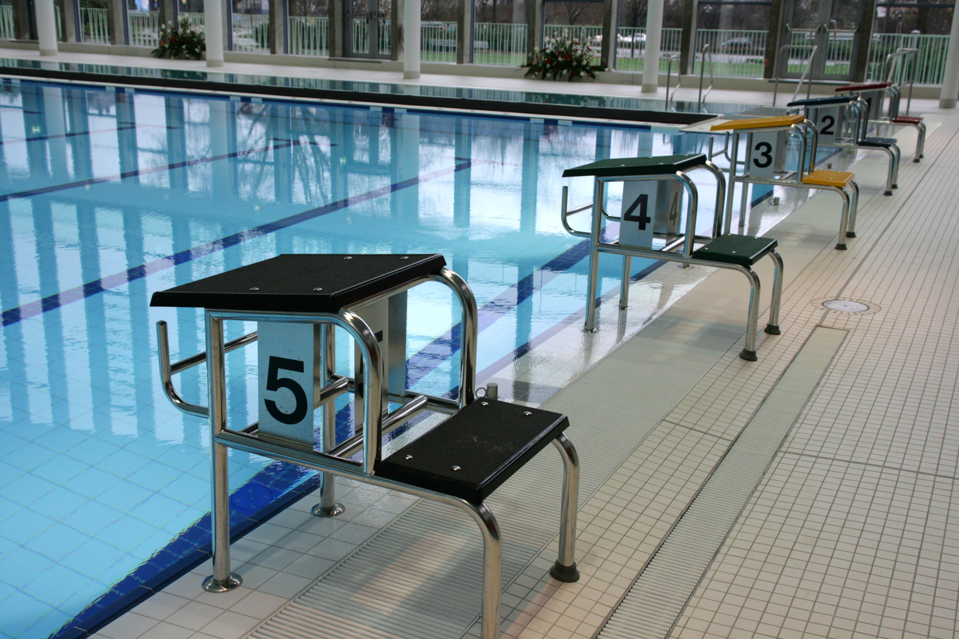 Schwimmoper in Wuppertal am Tag der offenen Tür (26.03.2010) anlässlich der Neueröffnung